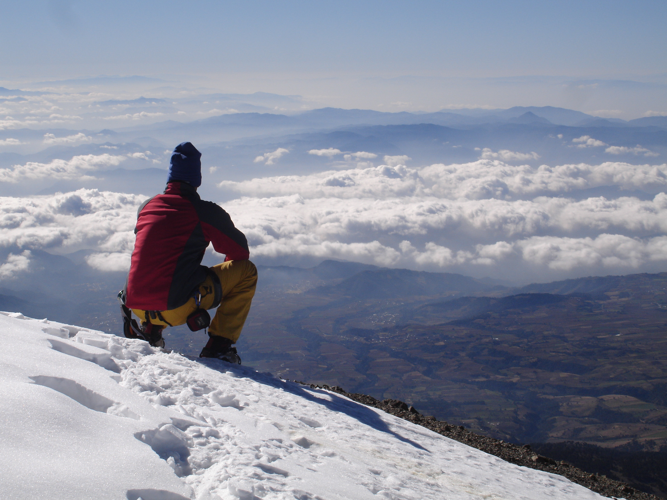 Esta serie no la tomé yo pero me ha encantado y con el permiso de Paco ahora las publico.